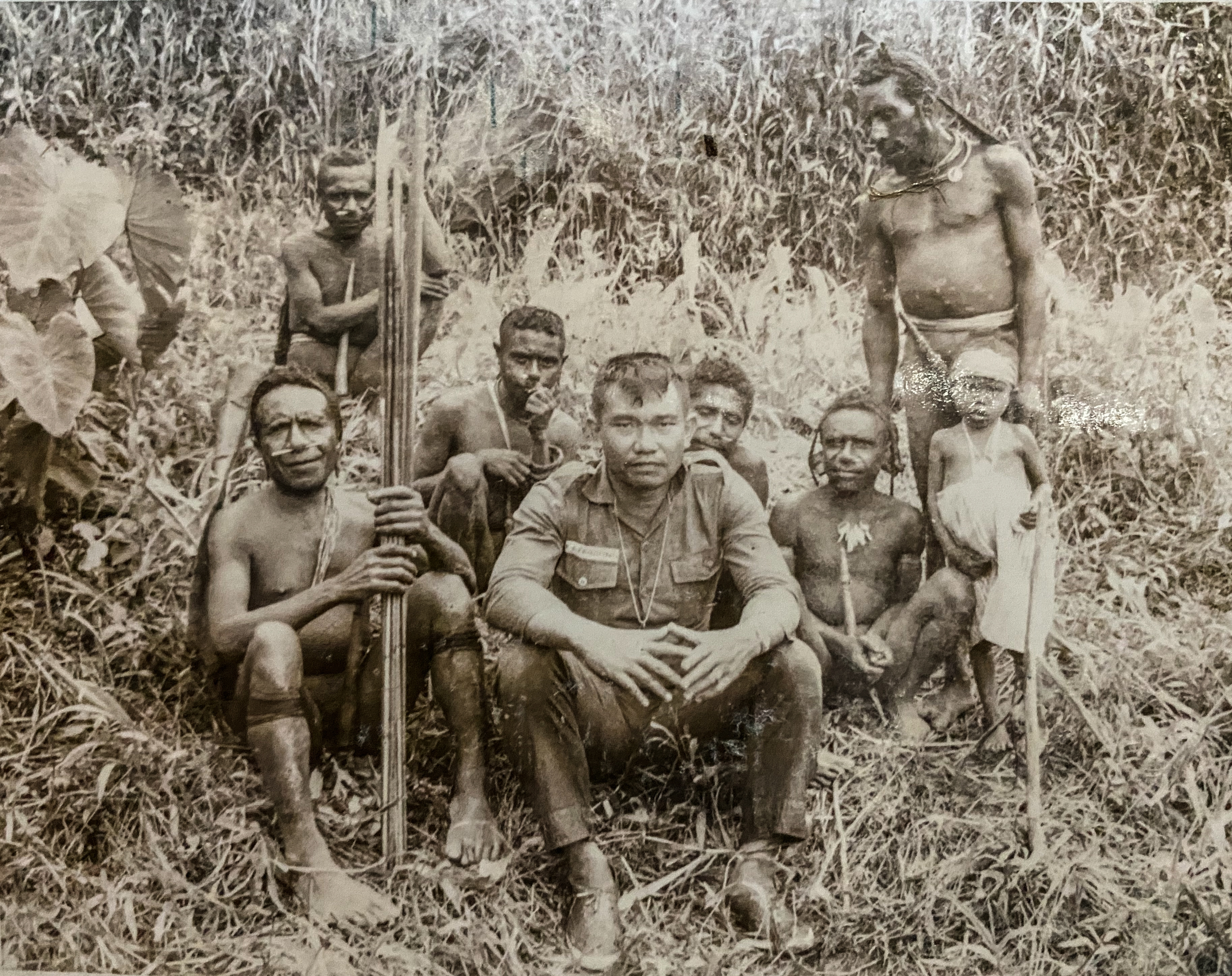 Feisal Tanjung ekspedisi lembah x